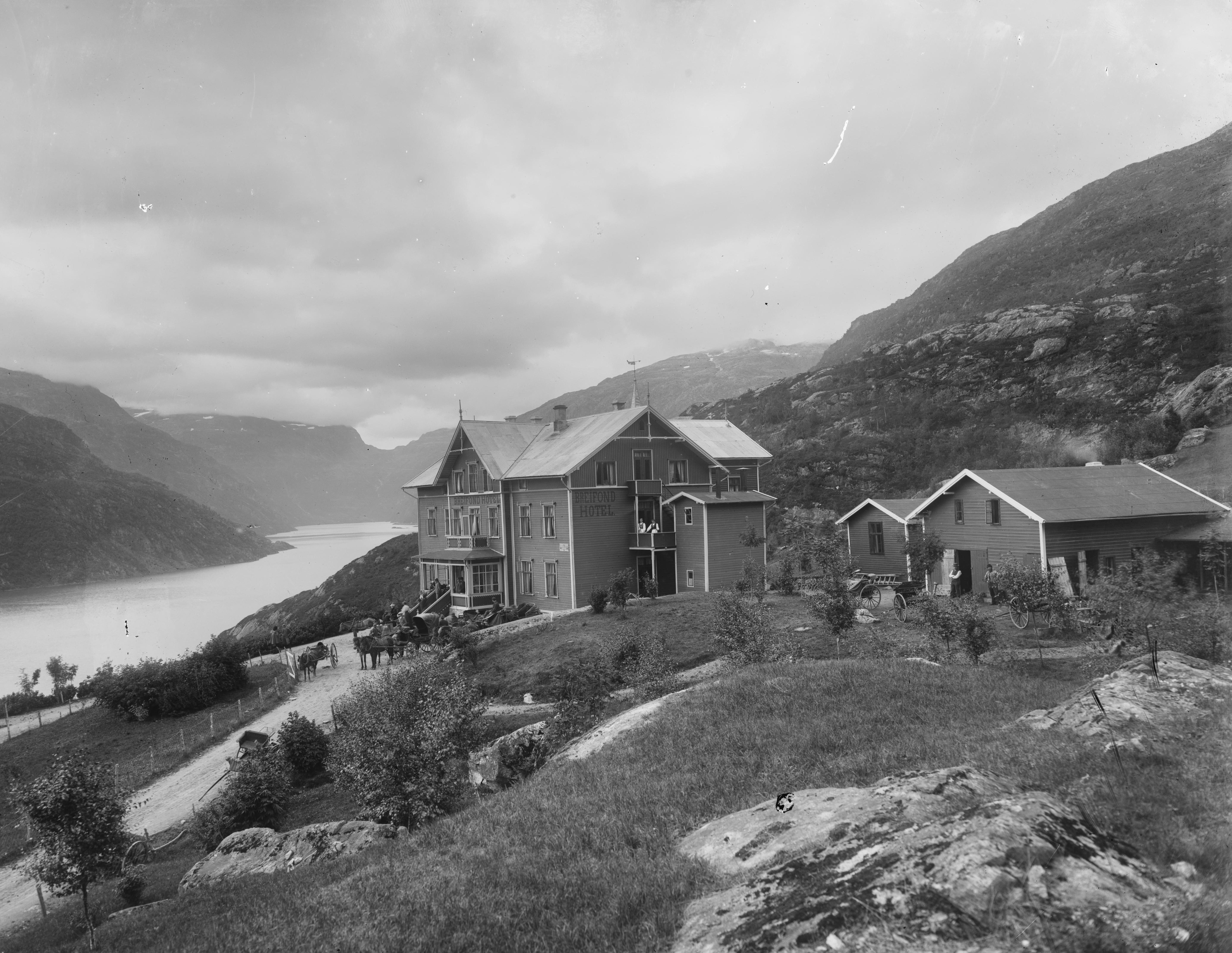 Påskrift negativ: No2055. Breifond Hotel, Hardanger. Skøien, Kristiania Eneberettiget 1898 Påskrift negativ: 275 Breifonn Hotell [Riksantikvaren] Påskrift konvolutt: B-275 Røldal. Horda. Hotel Breifonn [Riksantikvaren] [Negativet er eksponert med speilvendt resultat. Rettet opp.] Sted: Røldal,Røldalsvatnet Kommune: Odda Fylke: Hordaland Tagger: Breifond hotel hotell landskap vann(innsjø)